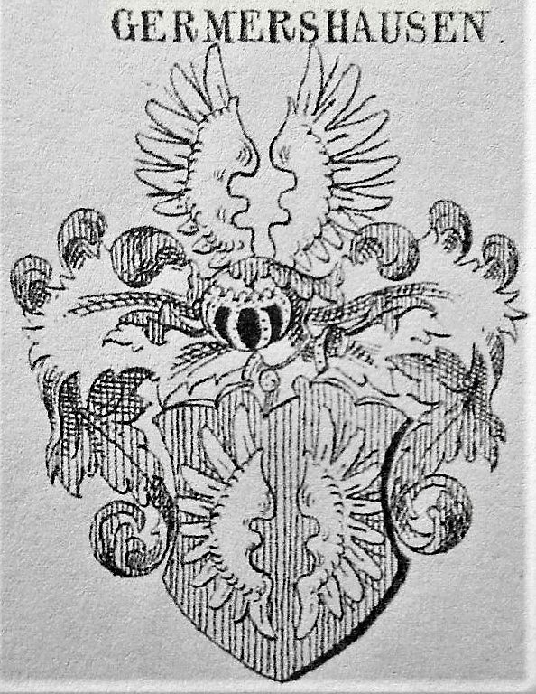 Germershausen; Abgestorbener Adel Provinz Brandenburg, Offener Flug im Siebmacher Band VI,5 Tafel 17, auch abgestorbener Adel Fürstenth. Schwartzburg. Siebmacher Bd.VI 13 Tafel 6, Darstellung des offenen Fluges für GER wie bürgerliches GER-NER -Wappen aus Wimpfen 16.Jh.